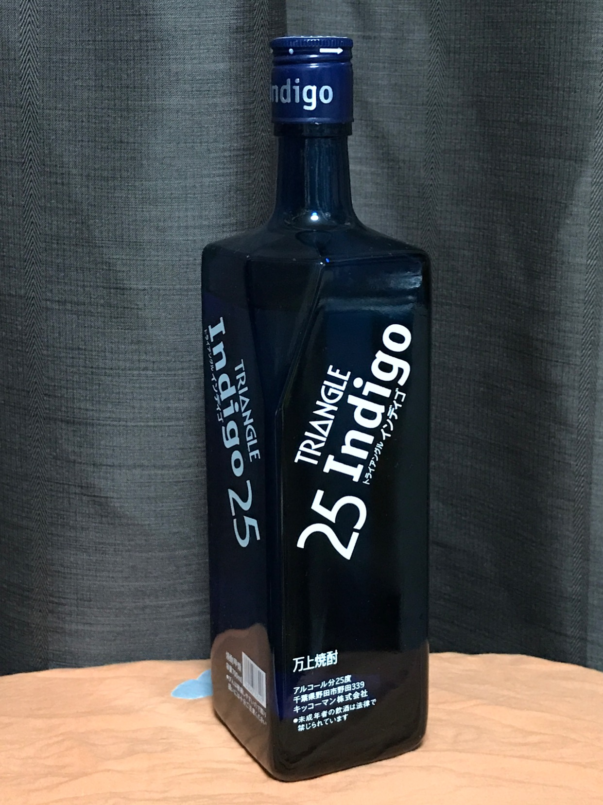 トライアングル インディゴ 自宅